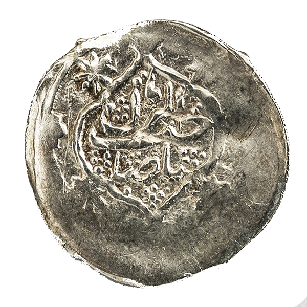 Naxçıvan xanı Kəlbəli Kəngərliyə (1804-1807) aid gümüş abbasi. AV – Çərçivədə "Zərb Naxçıvan 1221” (1806) sözləri zərb edilib.